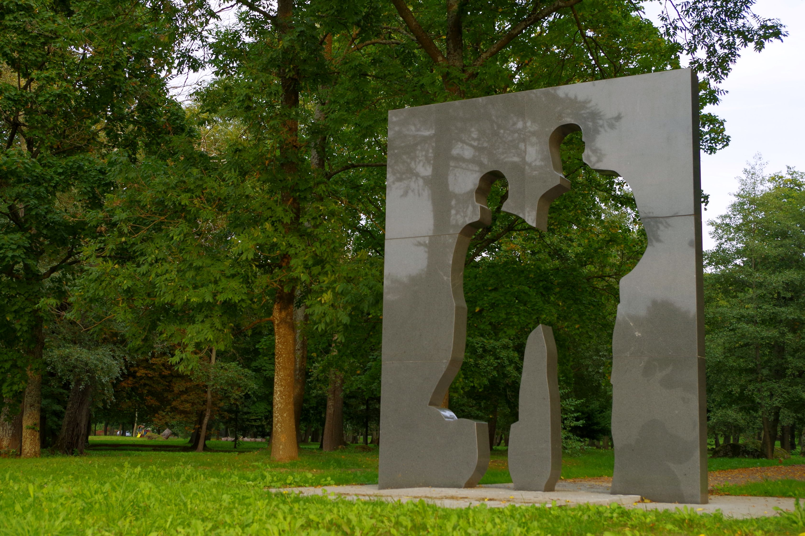 Viimsi mõisa park, 19.-20.saj.